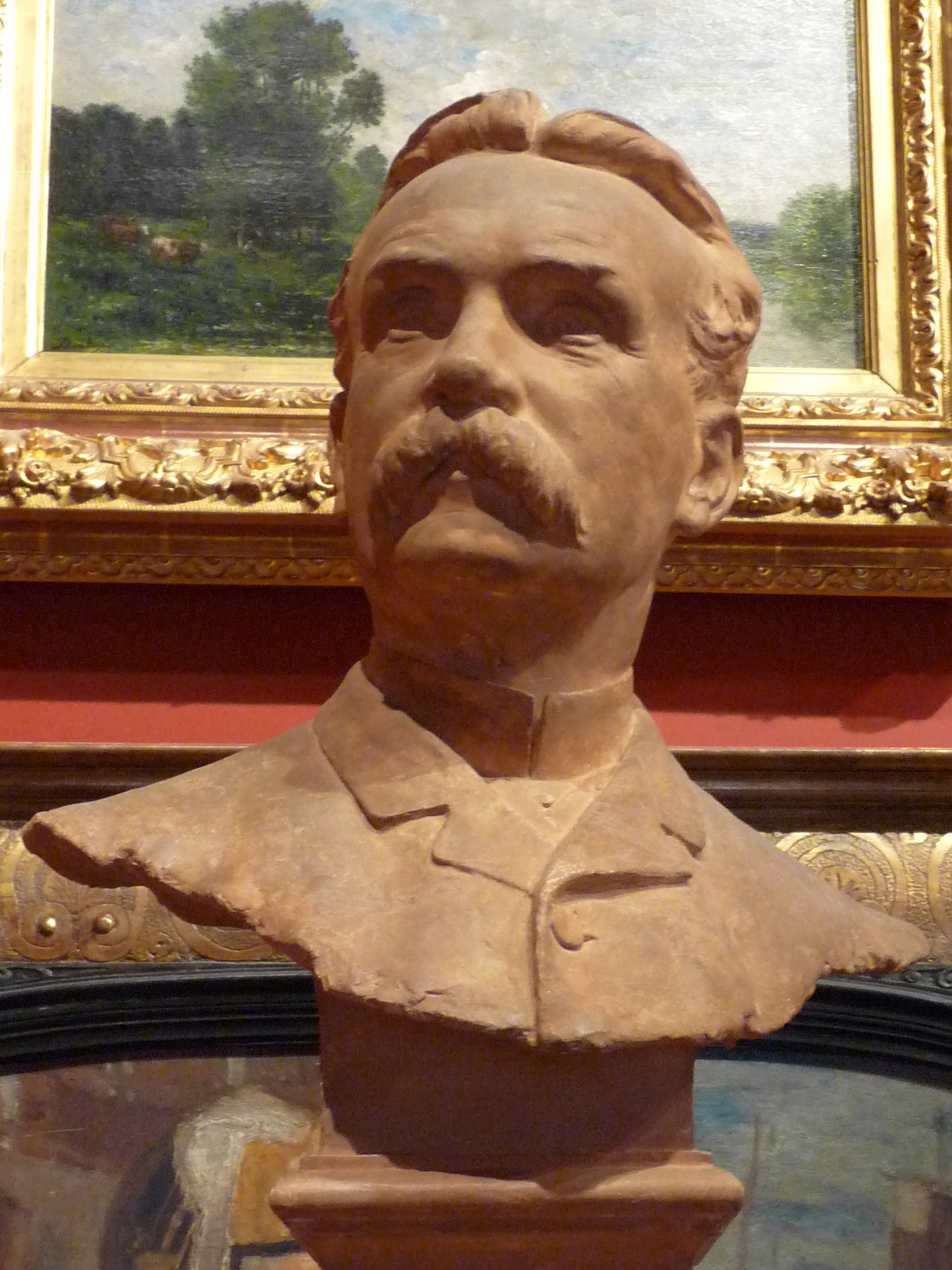 Buste d'Henry Vasnier par Léon Chavalliaud Description French sculptor Authority control : Q1879407 au Musée des beaux-arts de Reims